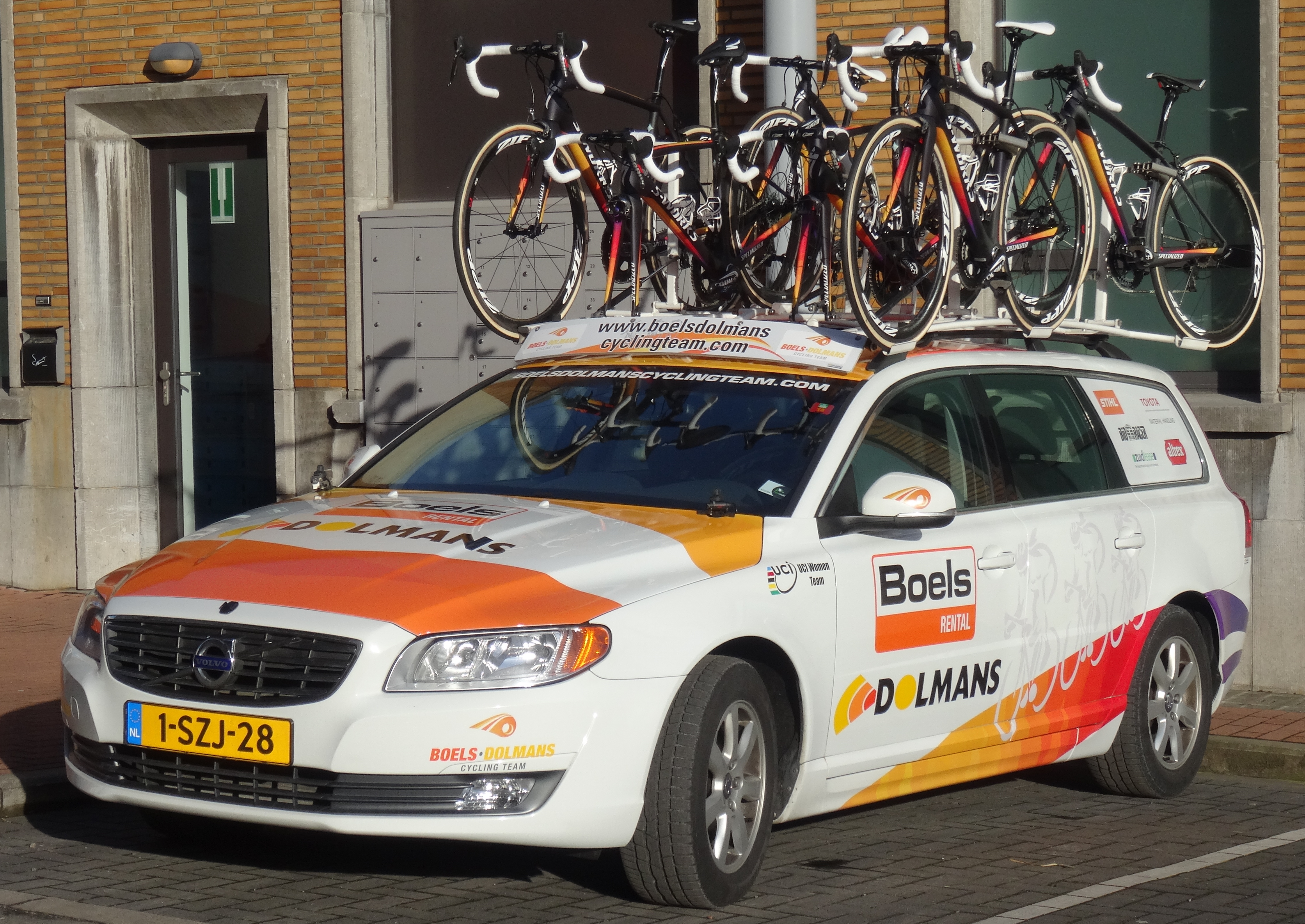 Reportage réalisé le mercredi 4 mars à l'occasion du départ du Samyn des Dames 2015 et du Samyn 2015 à Quaregnon, Belgique.